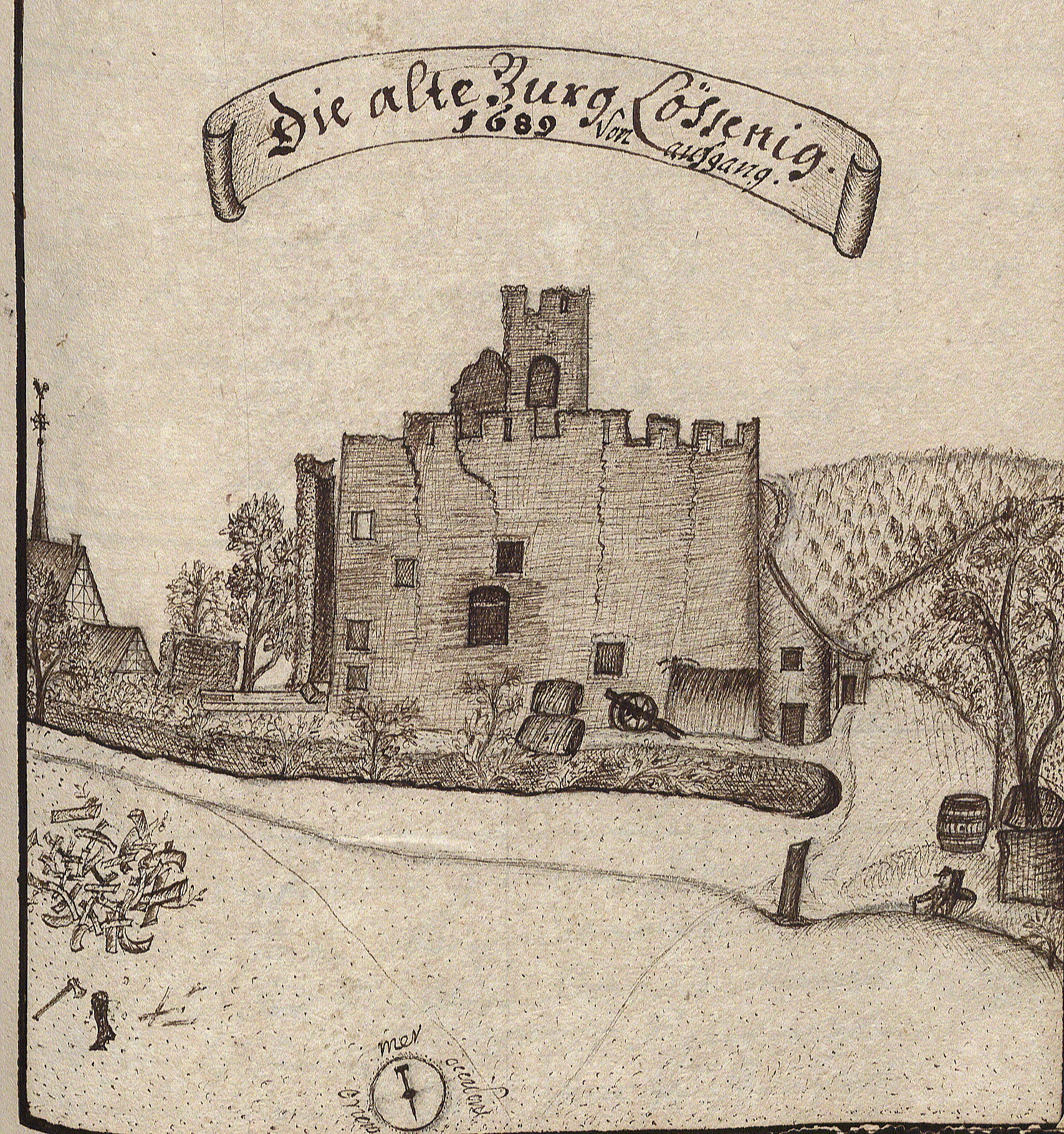 Teilansicht der Burgruine Lösnich im Jahre 1689. Handskizziert im Lagerbuch Band III, DK5196, S. 300, im Archiv der Reichsgrafen von Kesselstatt, hinterlegt im Stadtarchiv Trier.